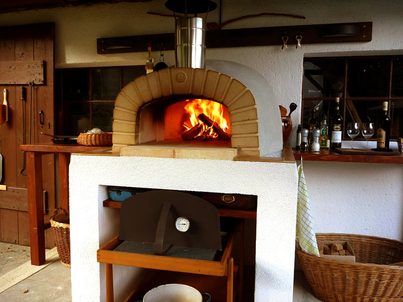 Hořící oheň v peci je podmanivý.